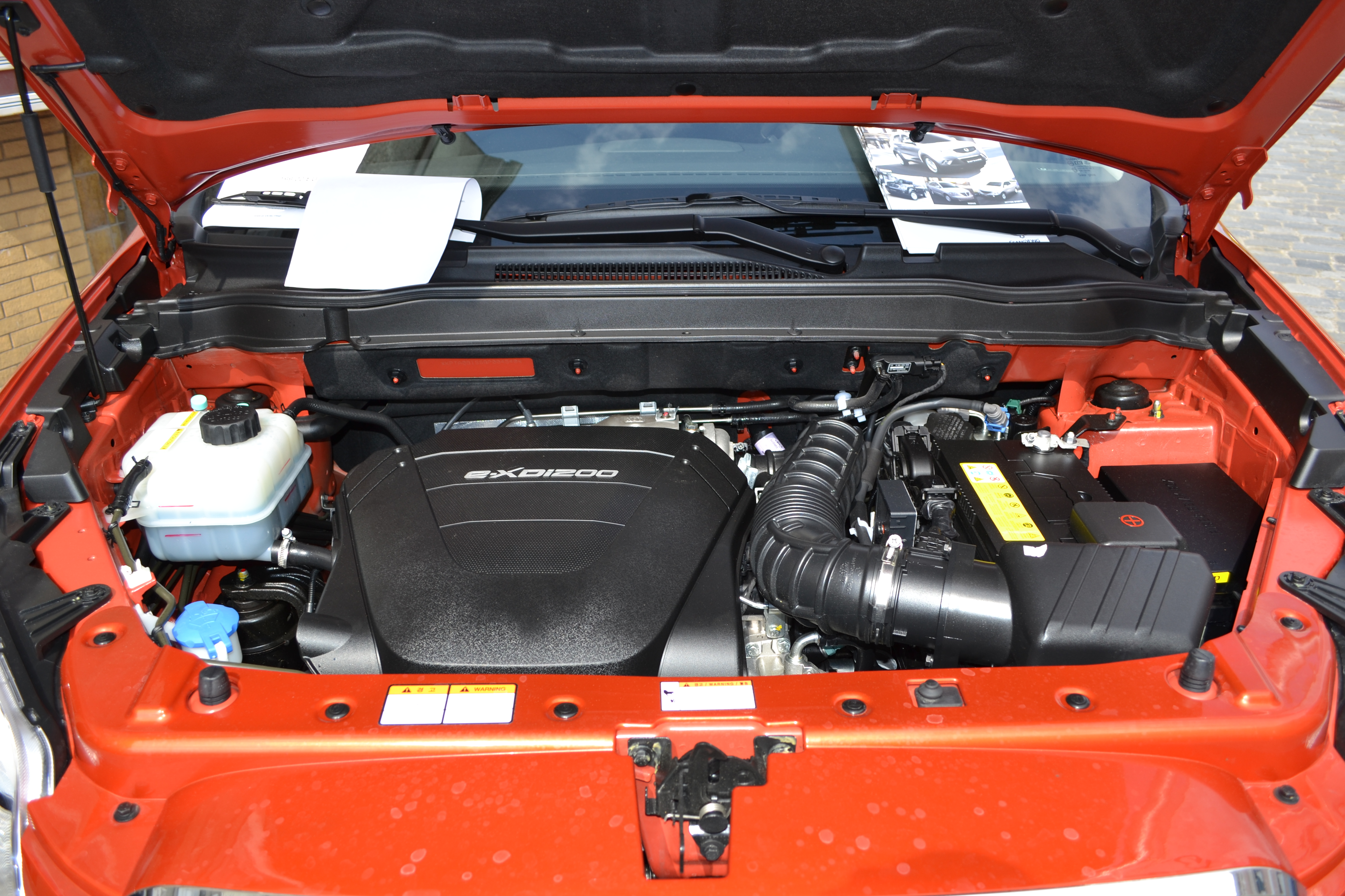 SsangYong e-XDi200 Motor eines SsangYong Korando D20T.